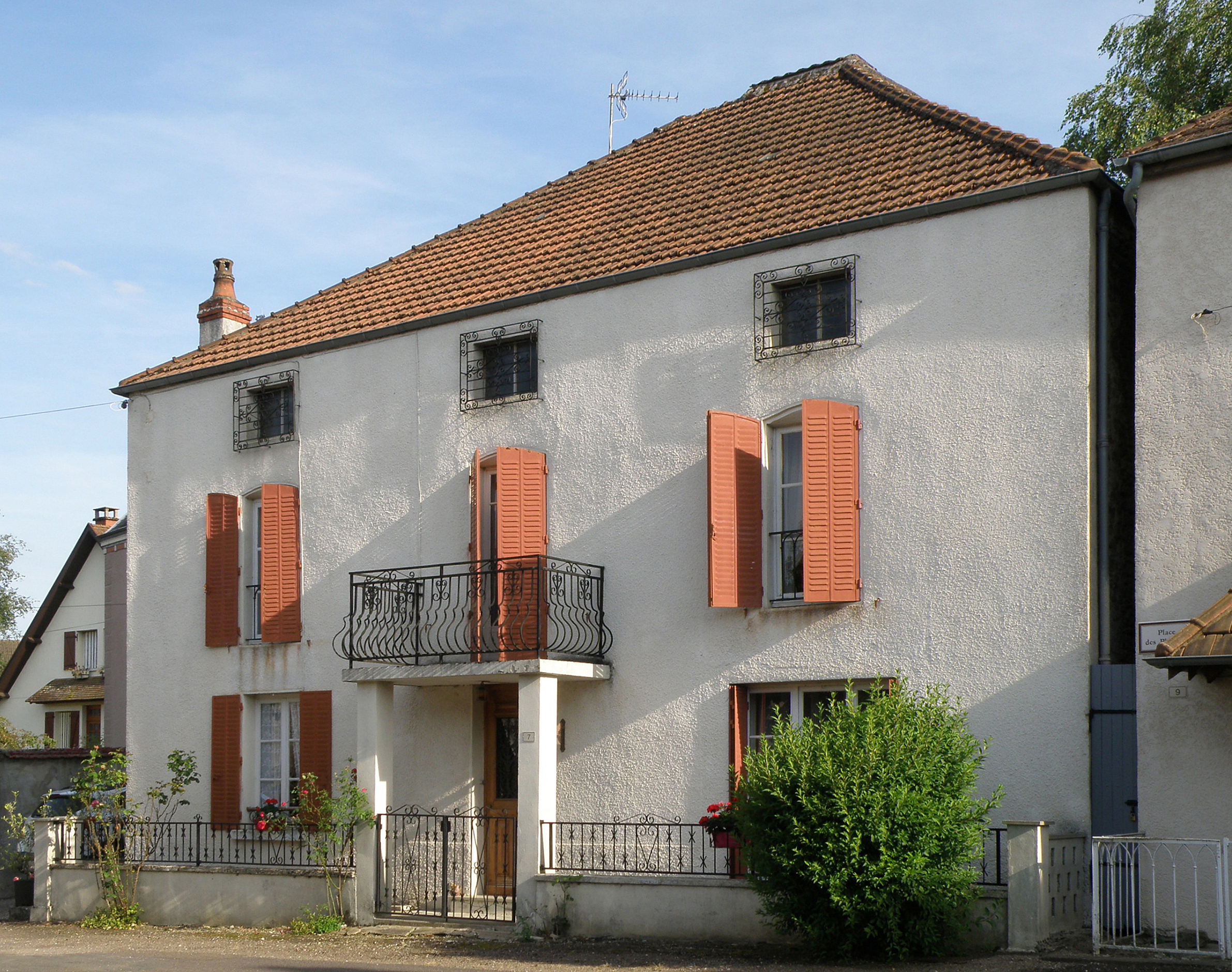 Paris-l'Hôpital (Saône-et-Loire, Bourgogne, France). Maison ancienne sise rue des Bayards.